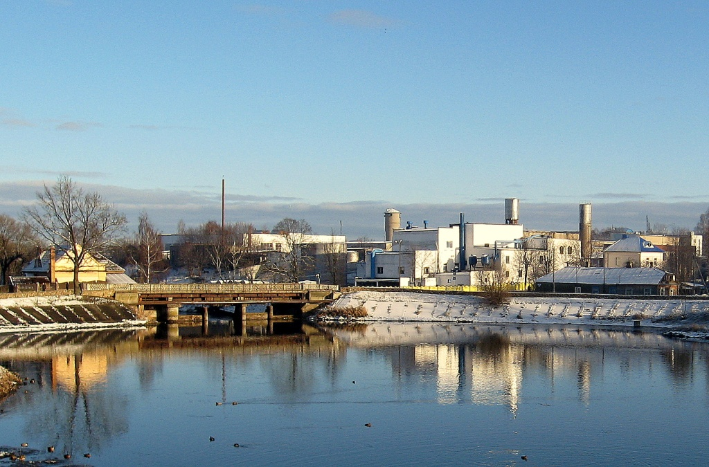 Ошмянский дрожжевой завод и "Старый млын"